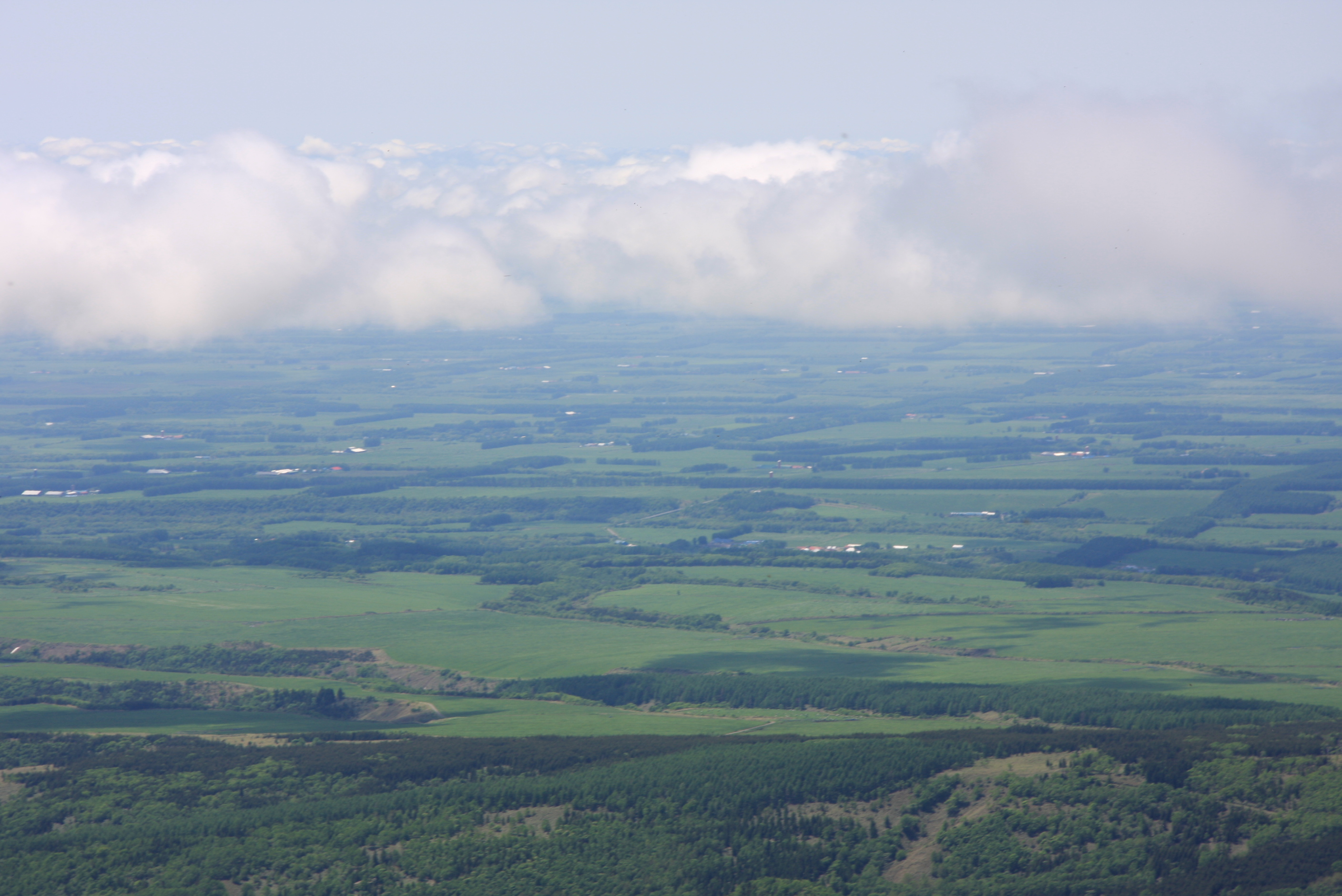 武佐岳より俯瞰する根釧台地